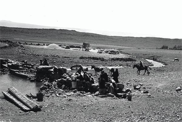 חולה - בדואים ליד מעין